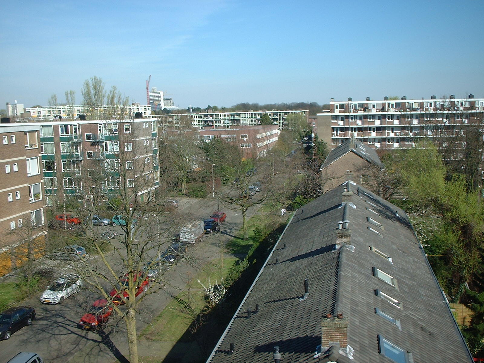 Uitzicht over Utrechtse wijk Tolsteeg